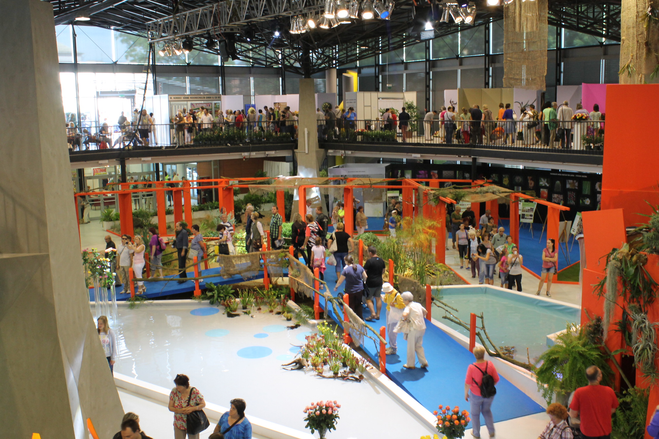 Flora Olomouc 2014